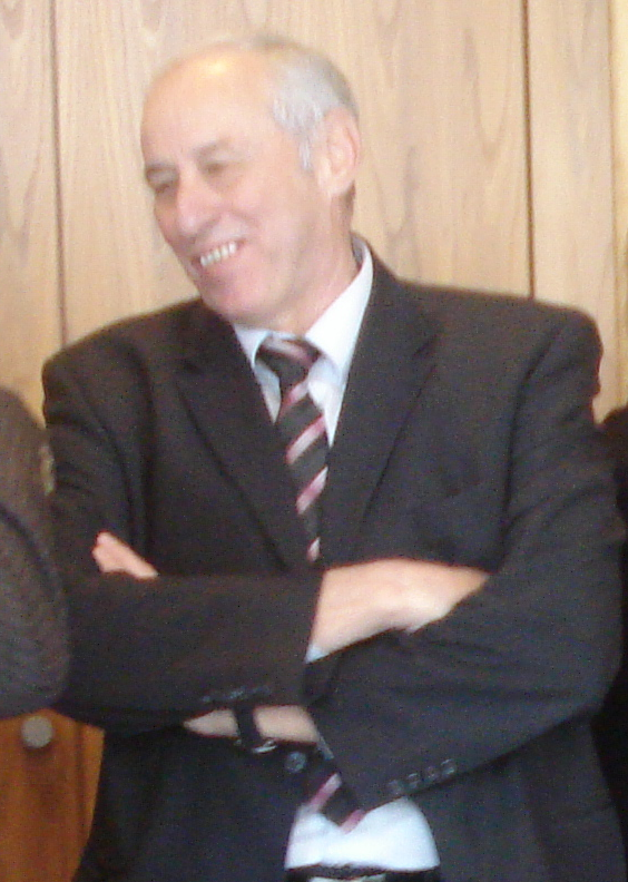 Jean-Marie Zoellé, actuel premier adjoint du maire de Saint-Louis (Haut-Rhin), lors de l'inauguration du pôle échange de la gare le 18 décembre 2010. Photo recadrée.